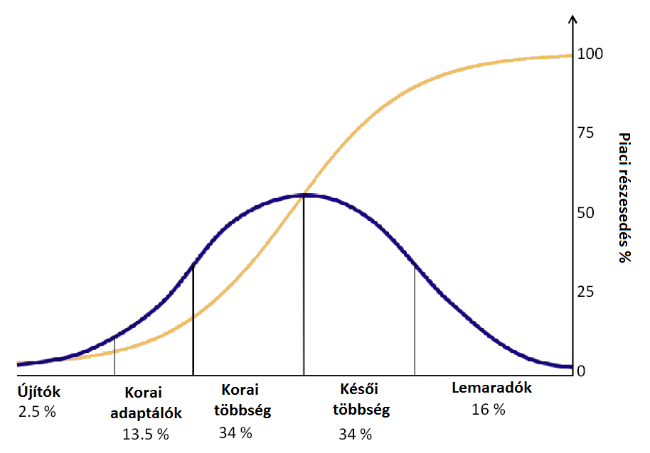 Rogers diffúziós elmélete. Az ábrán kékkel a fogyasztói csoportok, míg sárgával a piaci részesedés van jelölve.